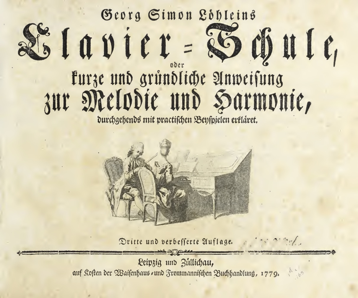 Page de couverture de la Clavier-Schule de Georg Simon Loeblein 1779